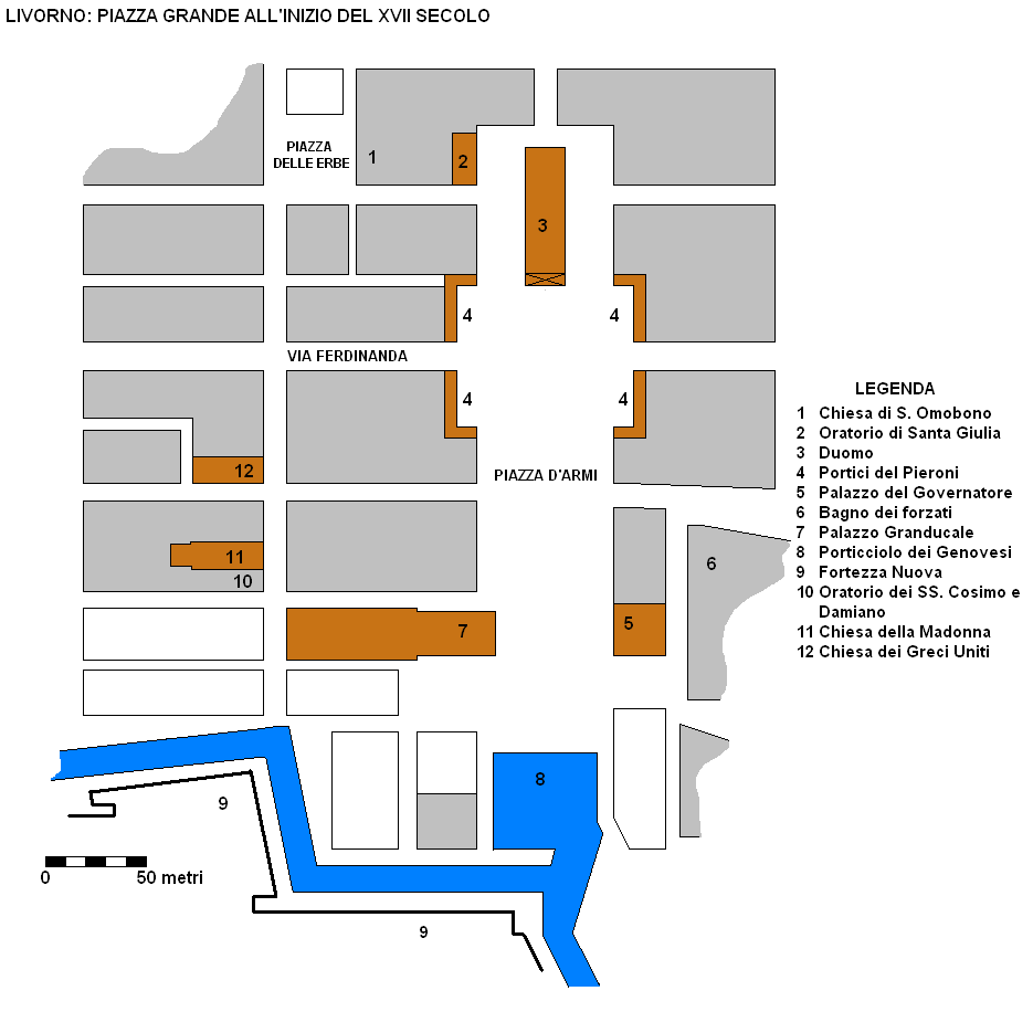 Livorno: planimetria di Piazza Grande, allora Piazza d'Armi, nei primi anni del XVII secolo; si nota la presenza del Porticciolo dei Genovesi, realizzato nel XV secolo quando ancora non esistevano la piazza e la città medicea progettata da Buontalenti. Si osservi infine la Fortezza Nuova che aveva dimensioni maggiori rispetto allo stato attuale.